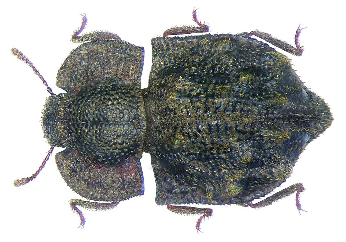 Tarphius monstrosus Wollaston, 1865 Familie: Colydiidae Grösse: 5,6 mm Fundort: Kanarische Inseln, La Gomera, El Cedro leg. Assing, 1998; det. Schuh, 1999 Foto: U.Schmidt, 2008